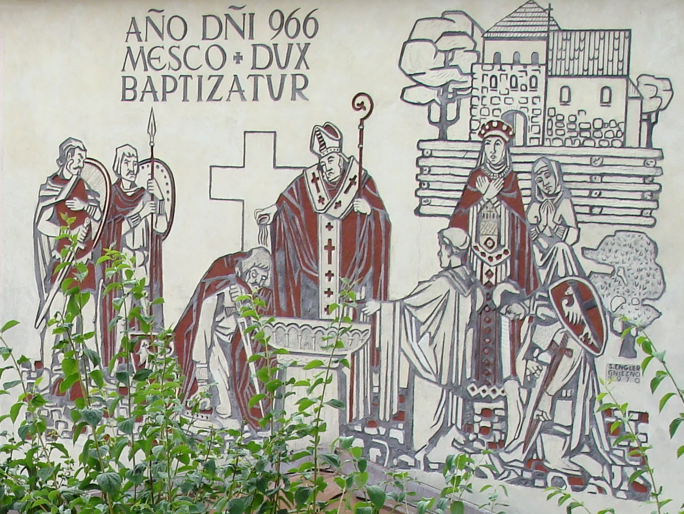 Mieszko bierze chrzest. Sgraffito na ścianie rezydencji biskupów pomocniczych położonej w pobliżu pomnika Bolesława Chrobrego, Gniezno